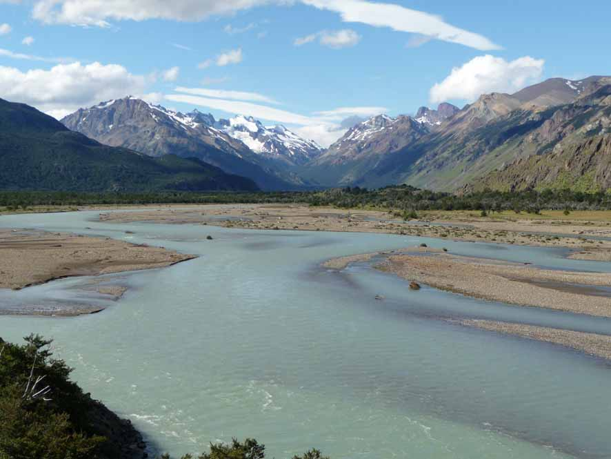 El Chalten